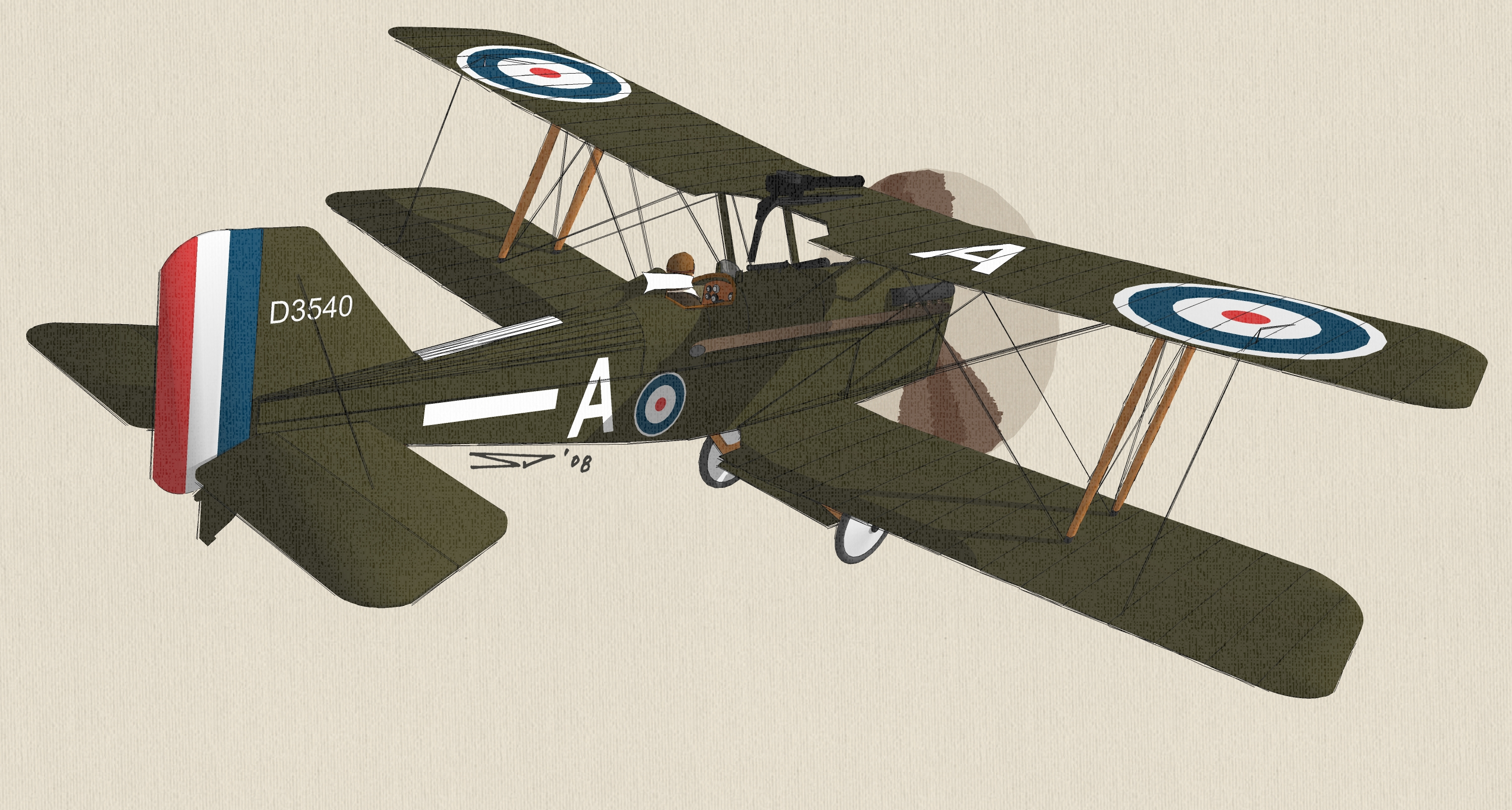 Edward "Mick" Mannock